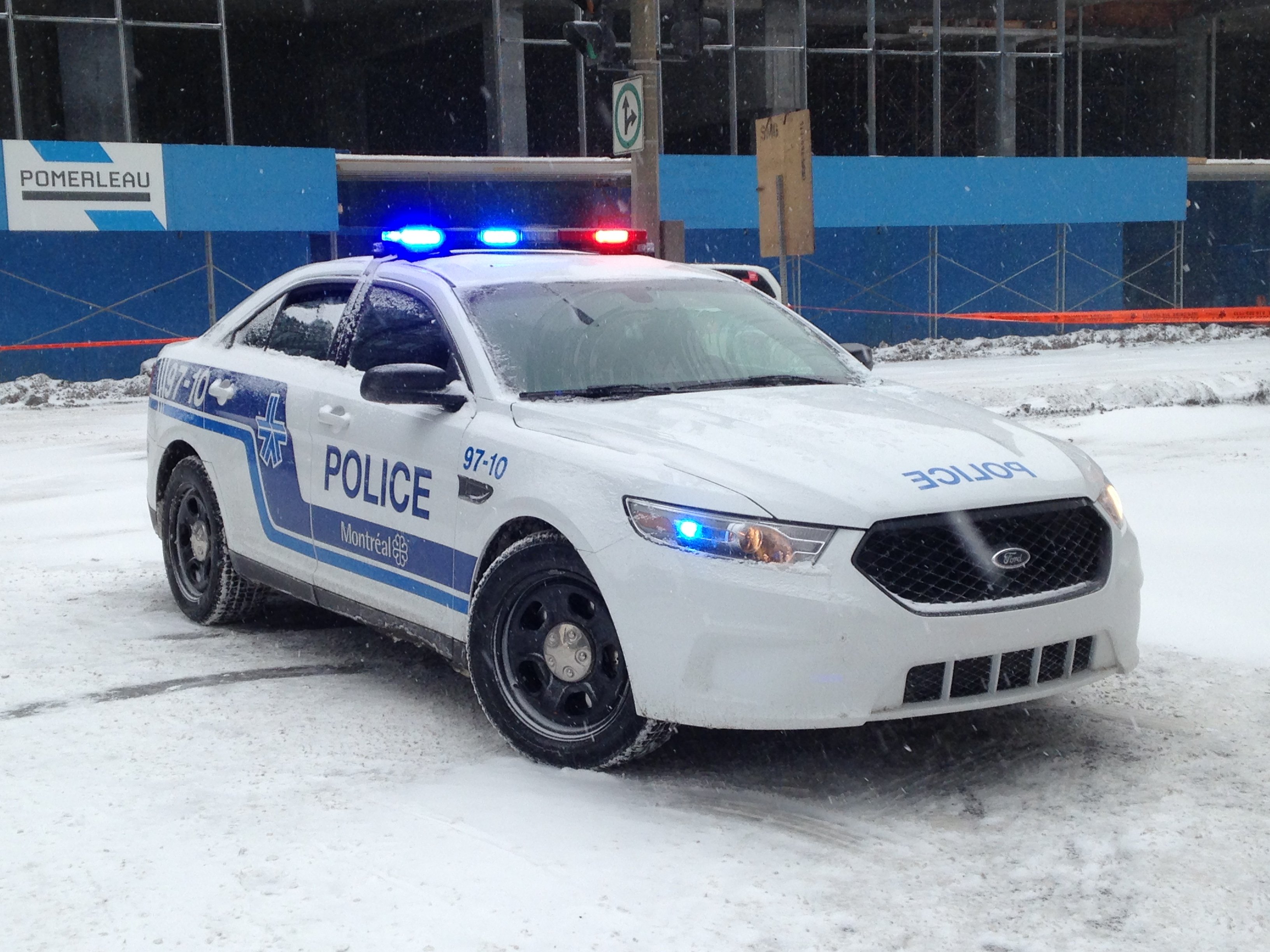 SPVM